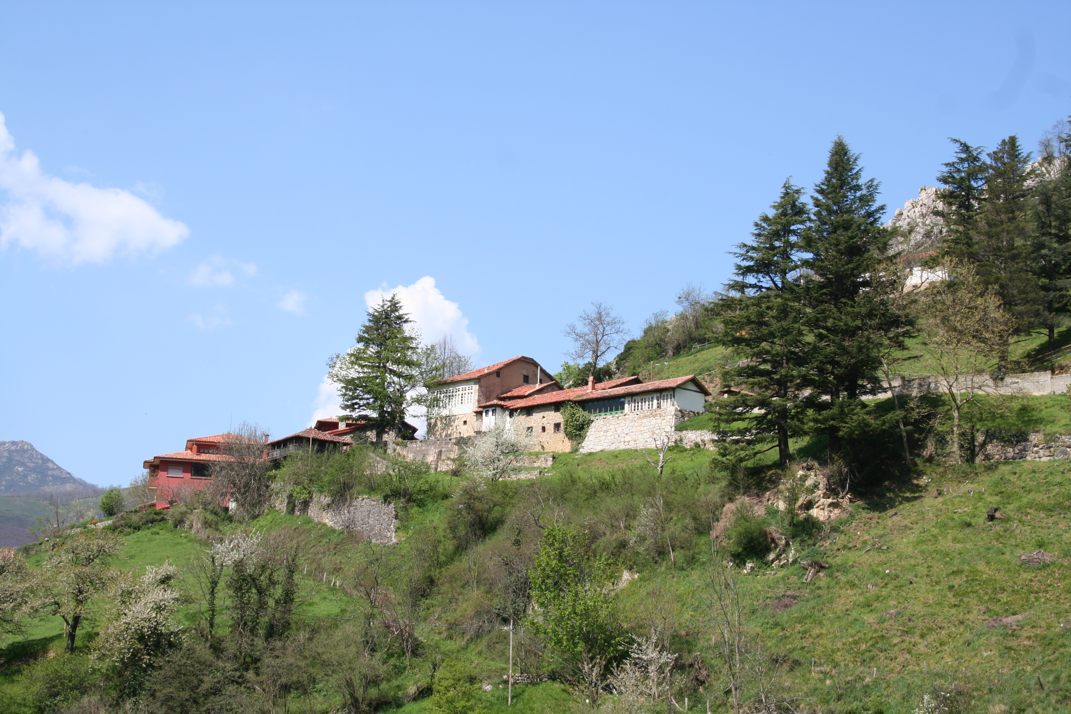 Localidad de Fresnedo en Teverga, Asturias